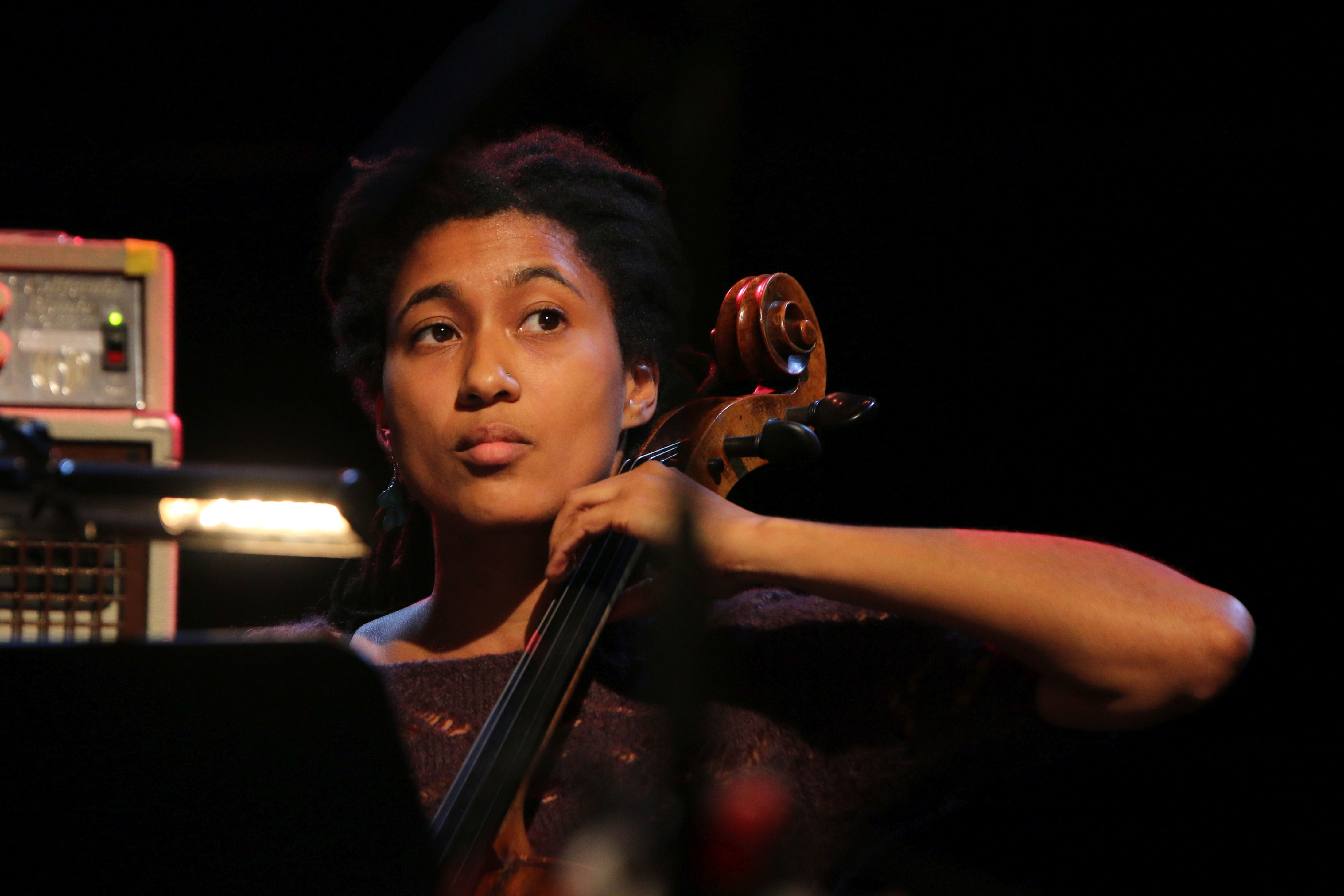 46. Deutsches Jazzfestival Frankfurt 2015: AACM Now Generation: Tomeka Reid